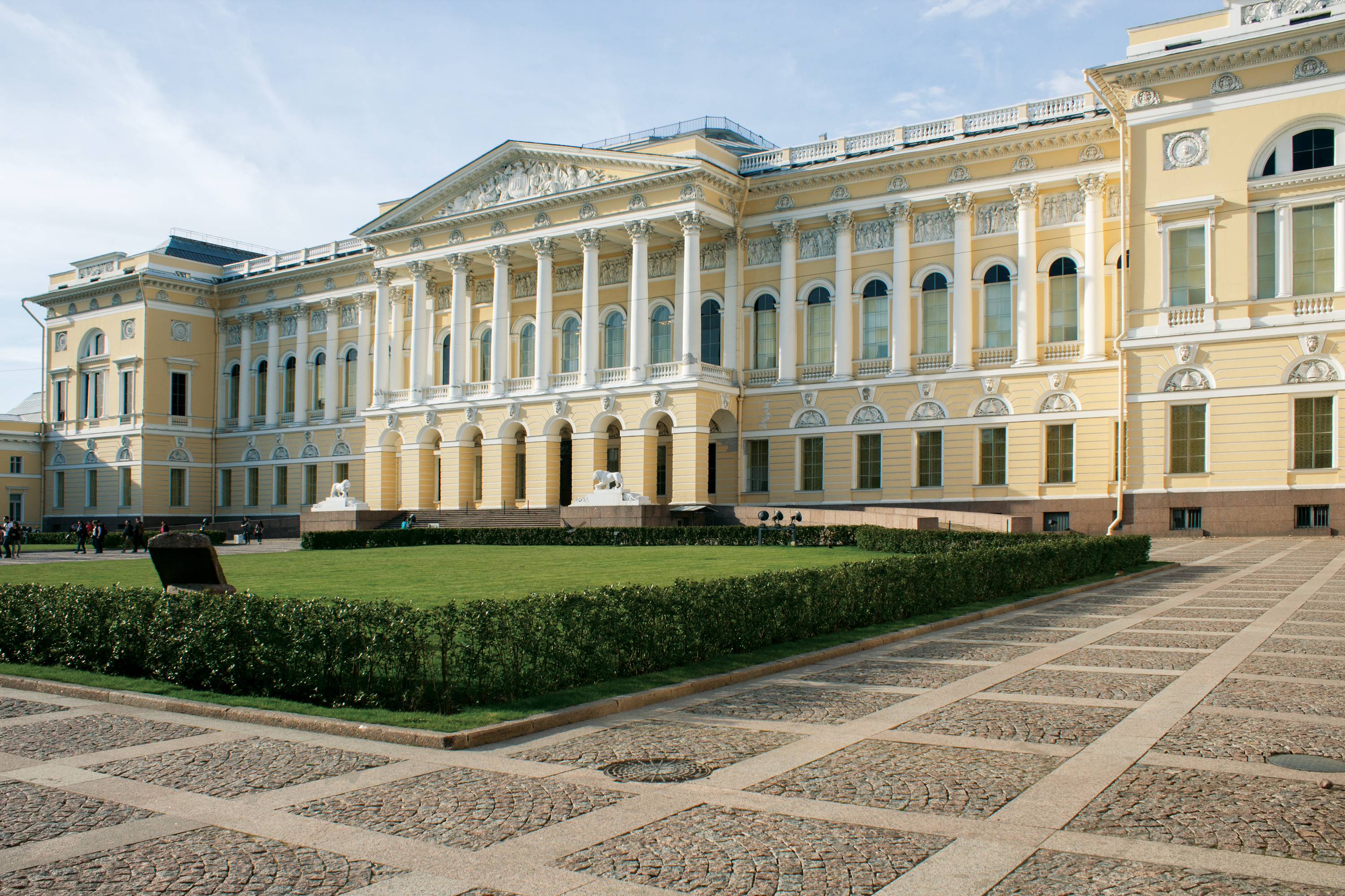 Главный корпус Русского музея: Инженерная улица, 4 (площадь Искусств), Центральный район, Санкт-Петербург